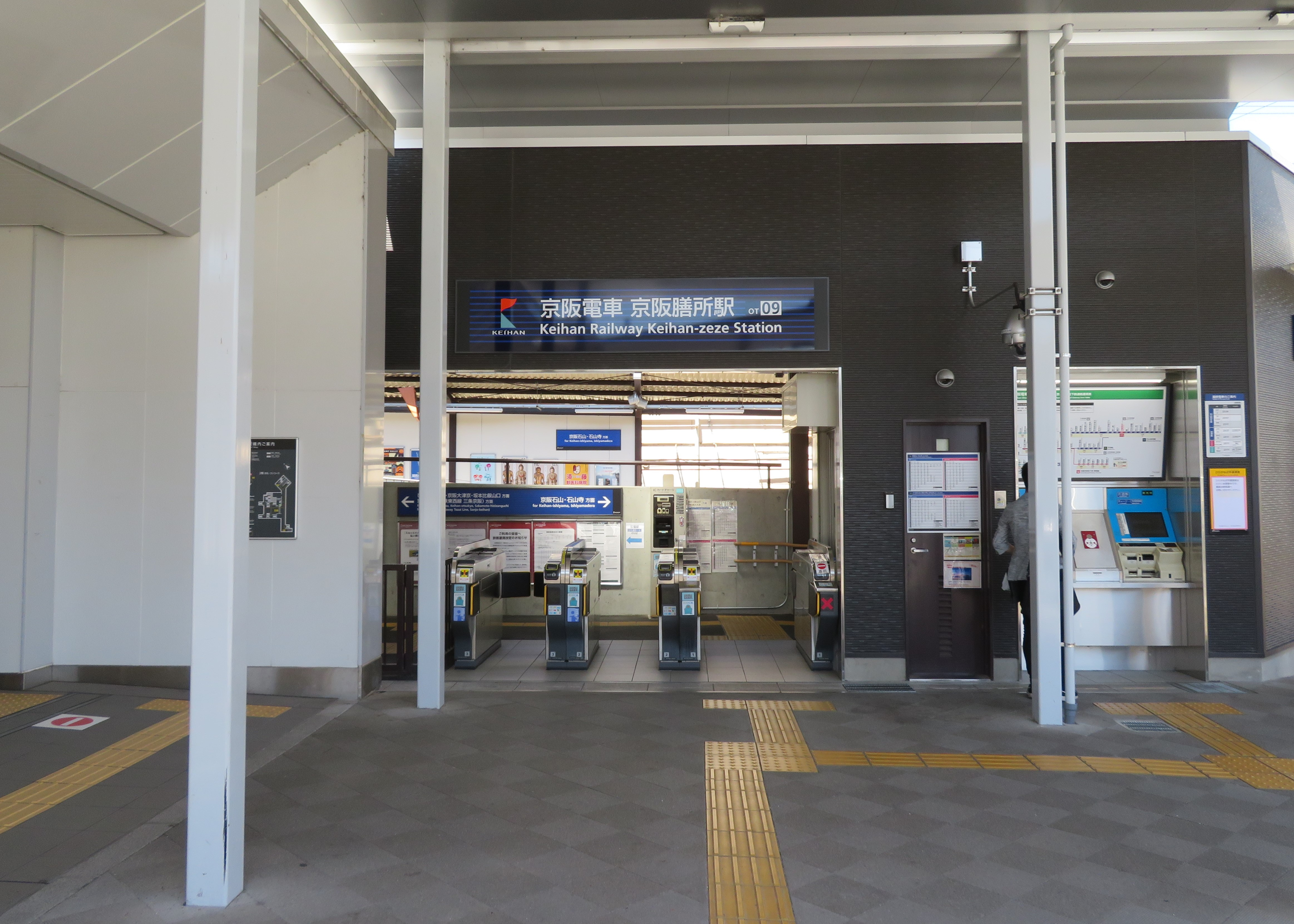 京阪膳所駅